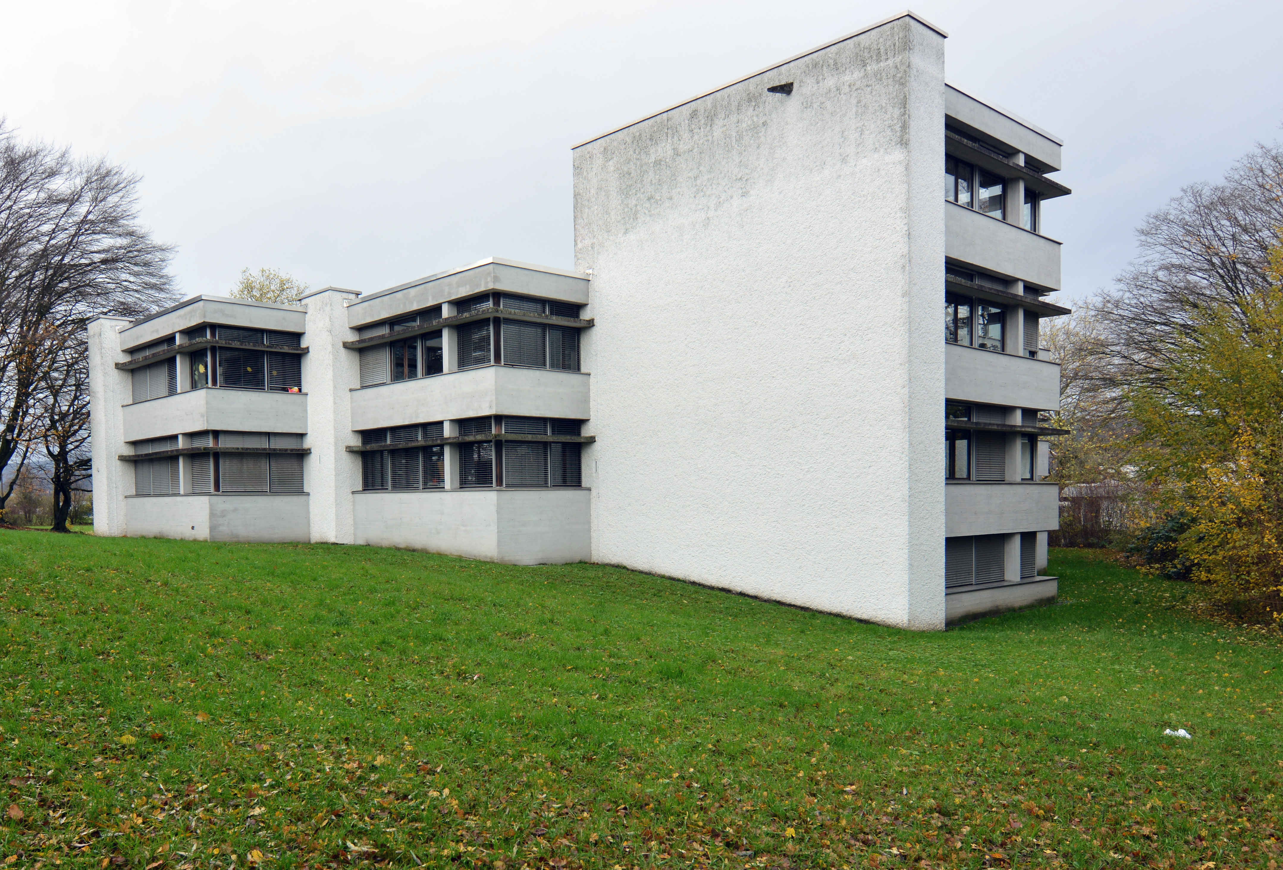 Das Primarschulhaus Im Fondli, Dietikon, 1962–65. Ansicht Klassentrakt. Architekten: Rudolf und Esther Guyer